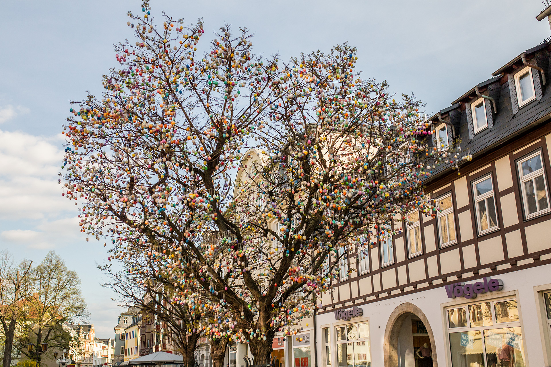 Der Saalfelder Eierbaum am 20. April 2017 in der Fußgängerzone im Stadtzentrum.